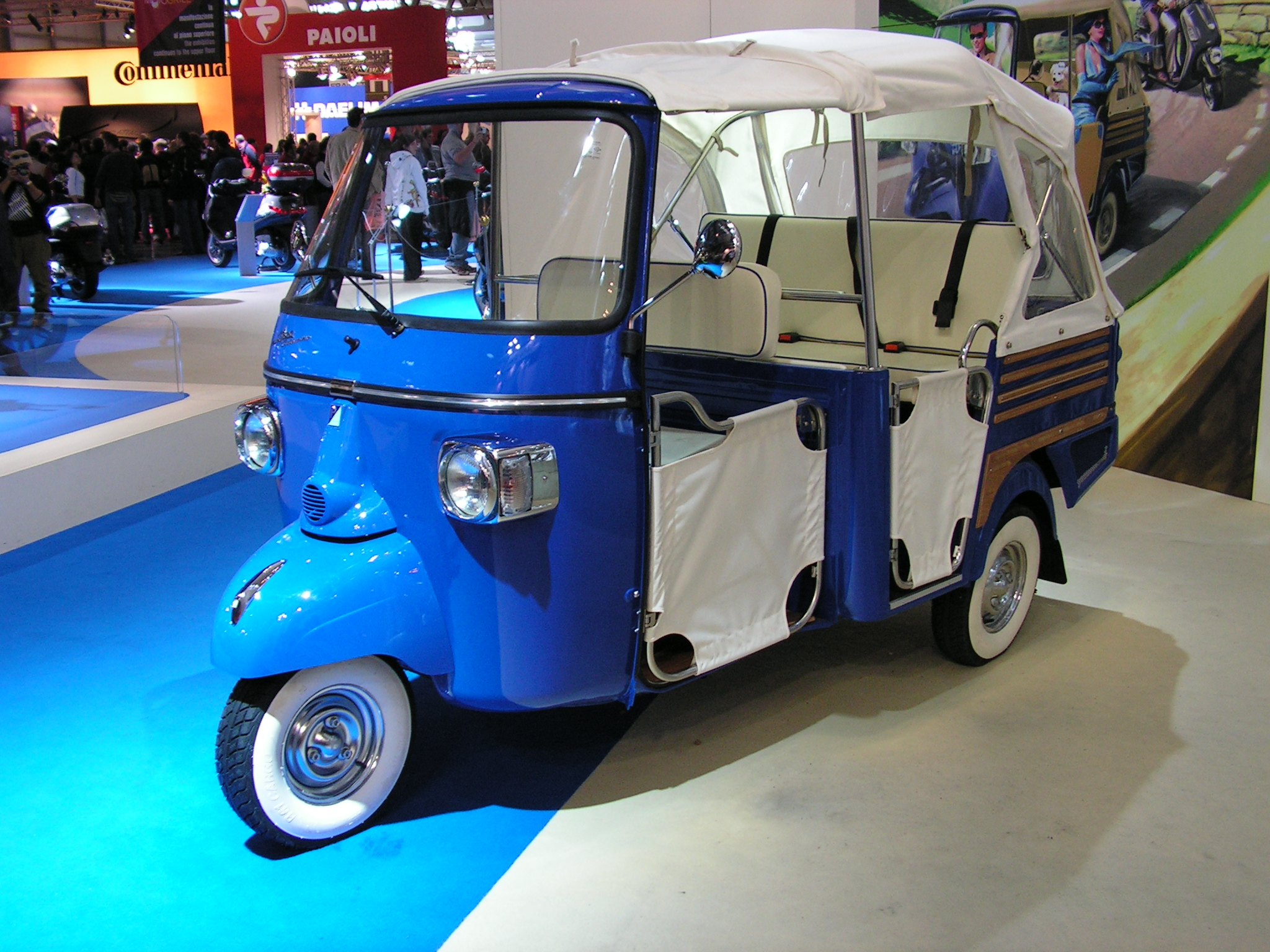 Piaggio Ape Calessino - EICMA 2007, Milan (Italy)